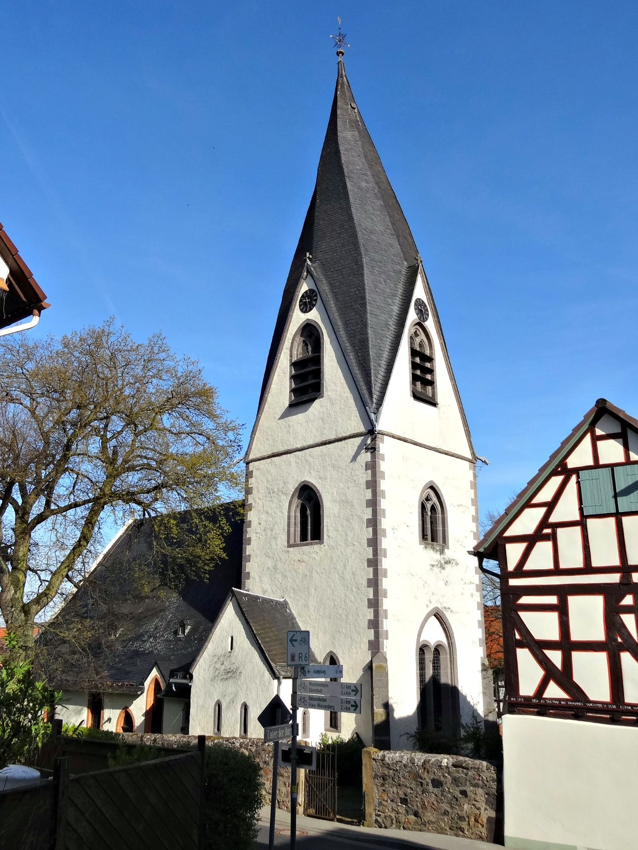 Evangelische Pfarrkirche Münzenberg